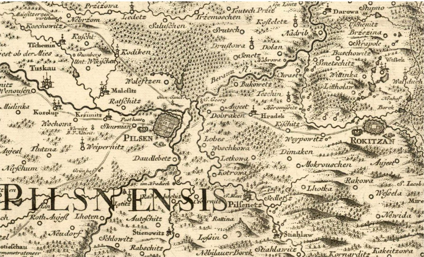 Výřez Müllerovy mapy Čech - okolí Plzně